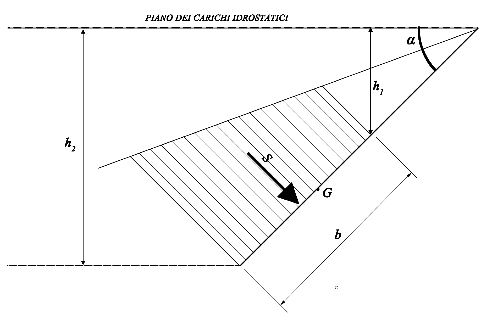 Carica spinta acqua inclinata